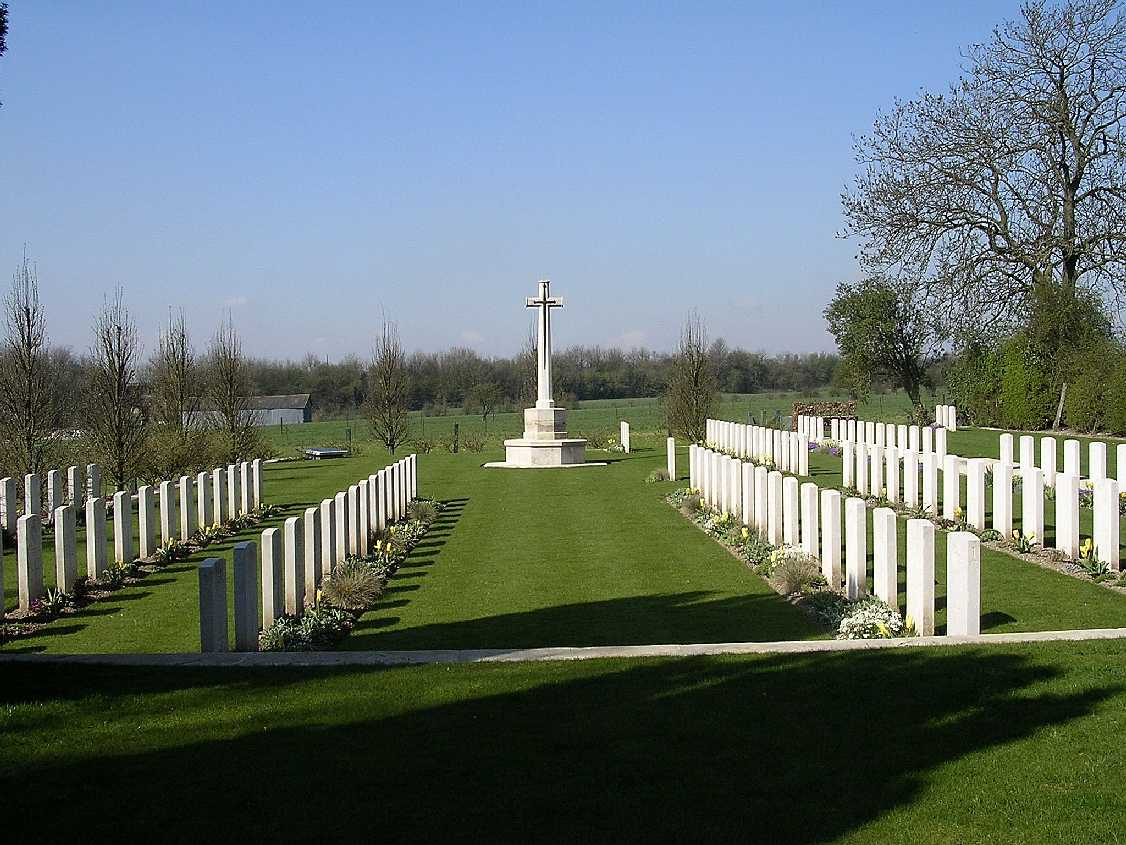 Cimetière militaire britannique de Dainville